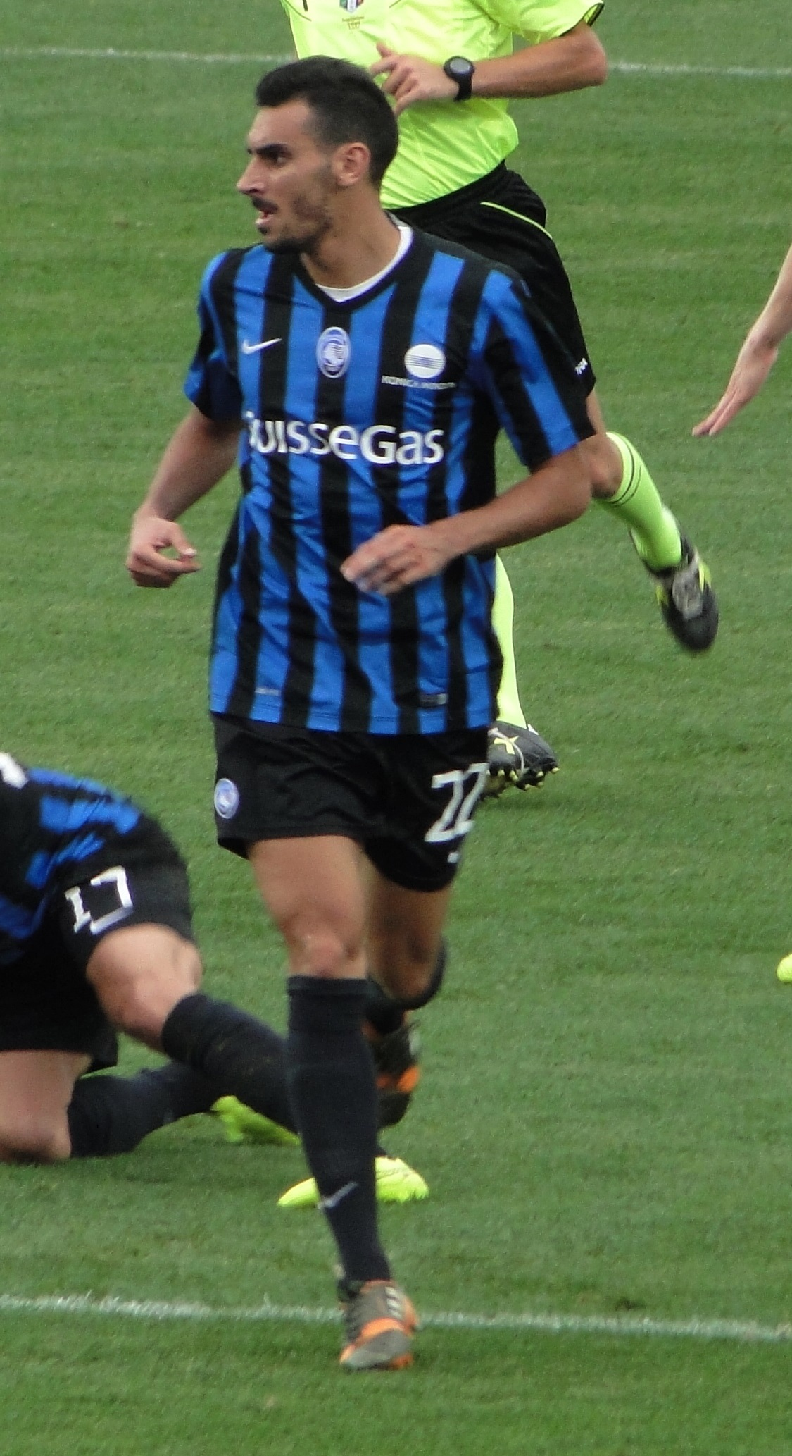 Davide Zappacosta, calciatore italiano, con la maglia dell'Atalanta